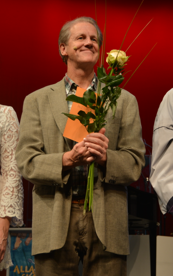 Anders Eriksson på Lorensbergsteatern 13 december 2014.